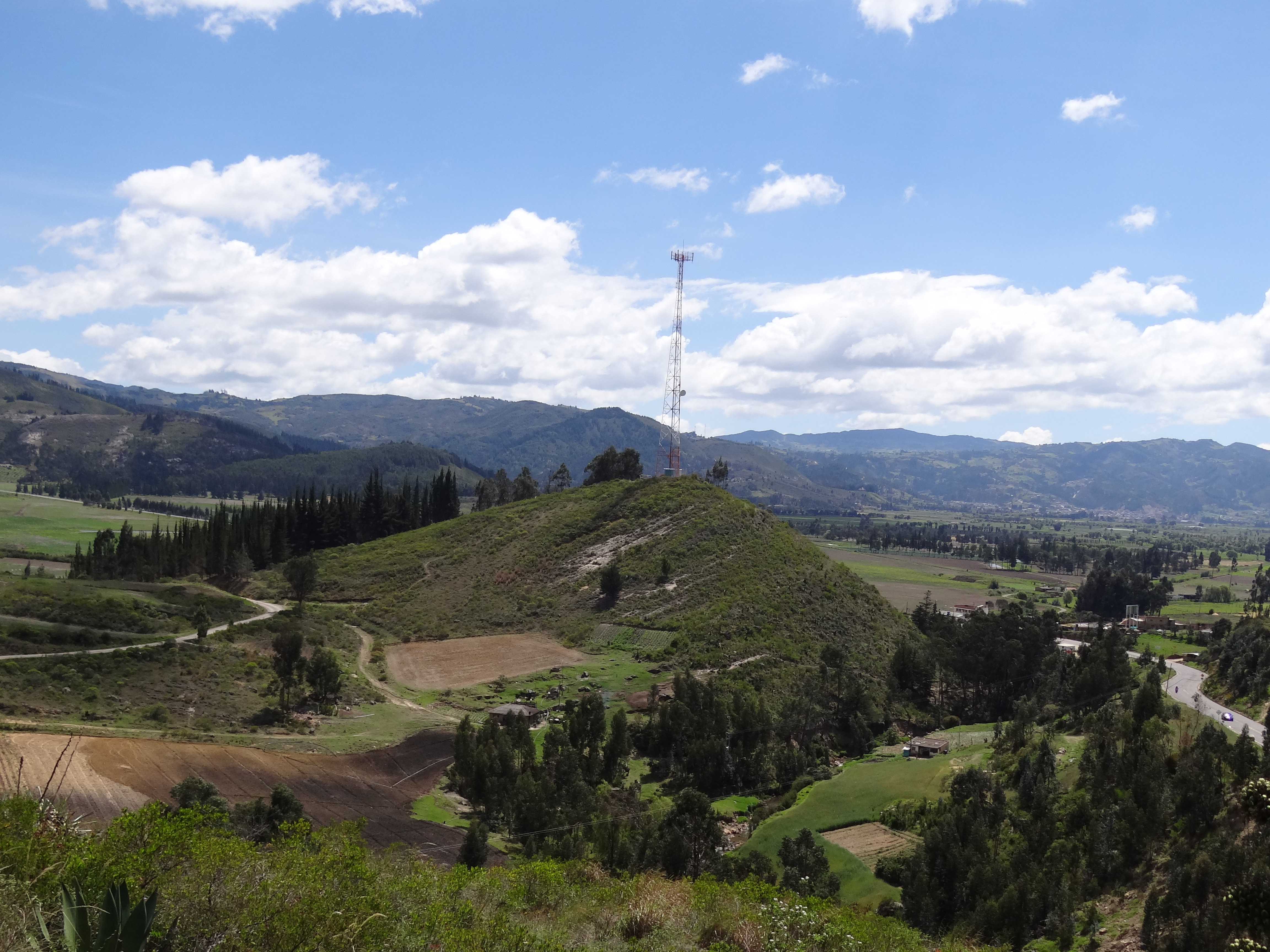 Sitio el desaguadero, donde confluyen las localidades de Samacá, Cucaita y Sora, en el departamento de Boyacá, Colombia